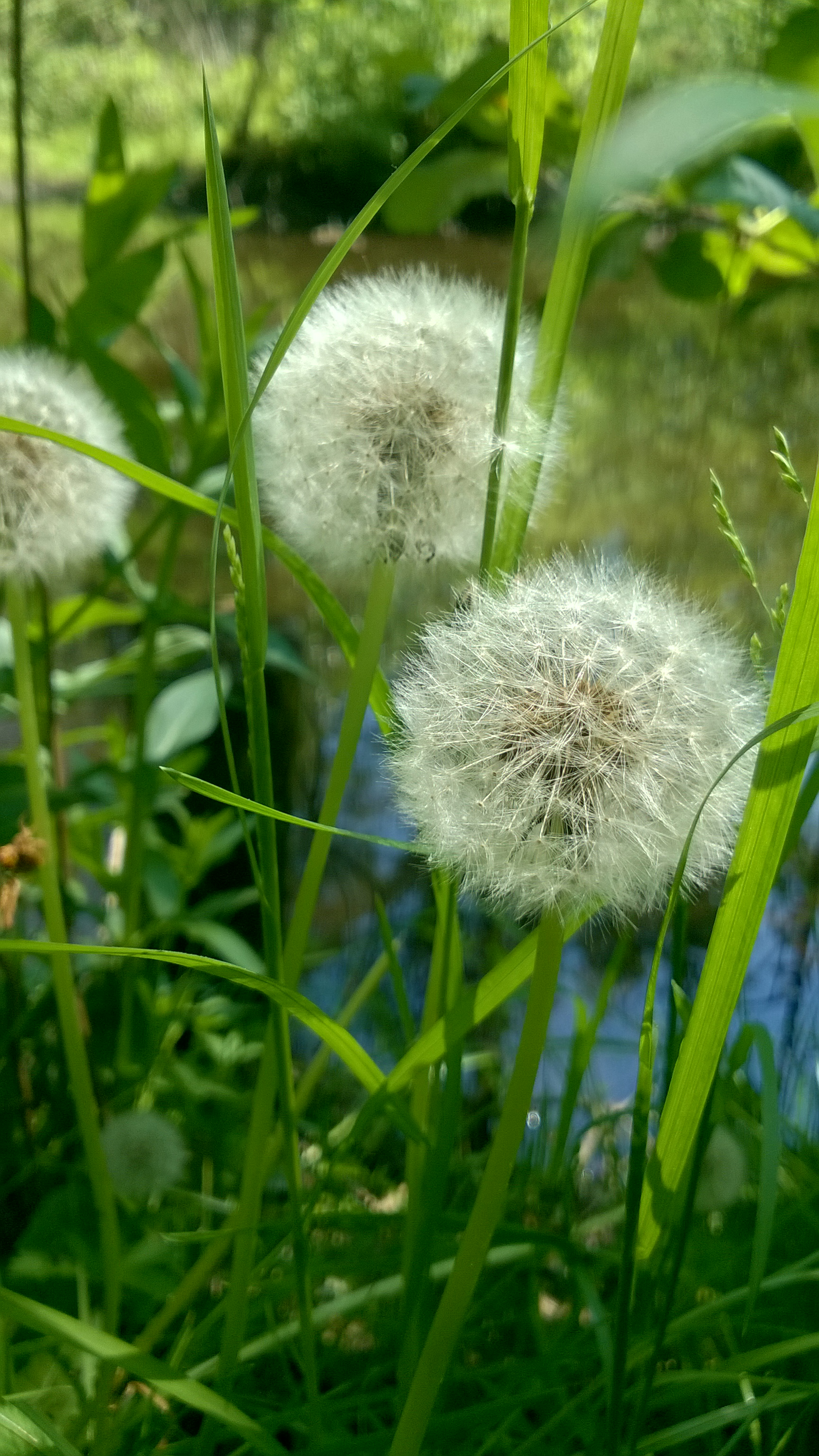 Löwenzahn im Tegeler Fließ in Waidmannslust, aufgenommen beim Naturtag der Freien Alternativschule Berlin